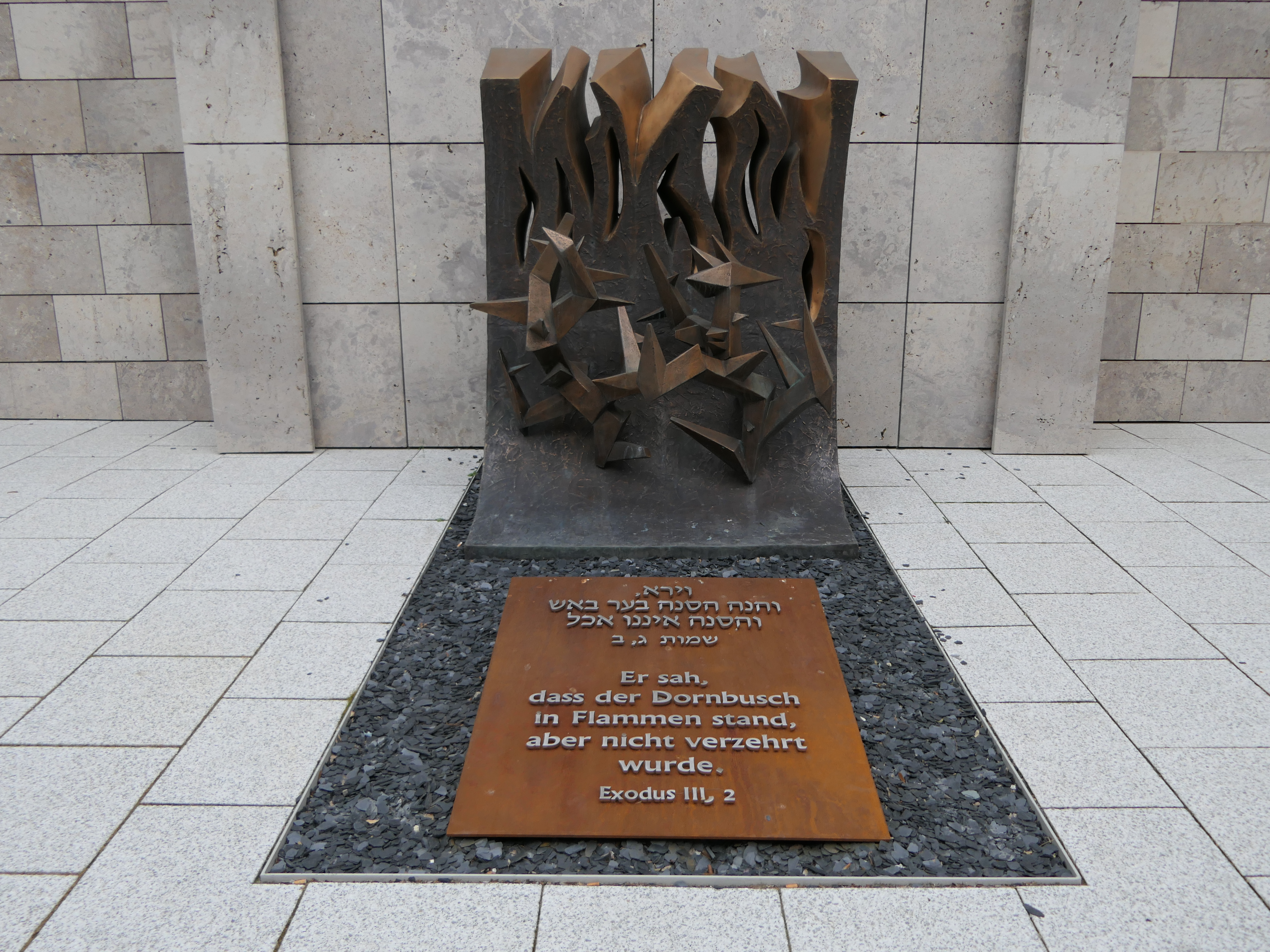 Bronzeskulptur "Brennender Dornbusch" des Stuttgarter Künstlers Roda Reilinger auf der 2019 neugestalteten Vorfläche der Stuttgarter Synagoge in der Hospitalstraße 36